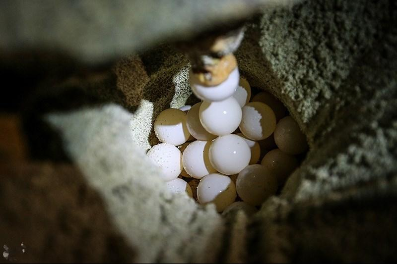 Hawksbill Sea Turtles on Iran’s Kish Island - KISH (Tasnim) – Guards on Iran’s southern island of Kish take care of the hawksbill sea turtles, an endangered species belonging to the family Cheloniidae, which lay clutches of eggs at the seaside and cover them with sand.